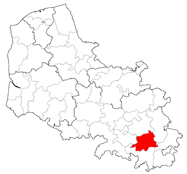 Localisation de la CCSA dans le Pas-de-Calais.